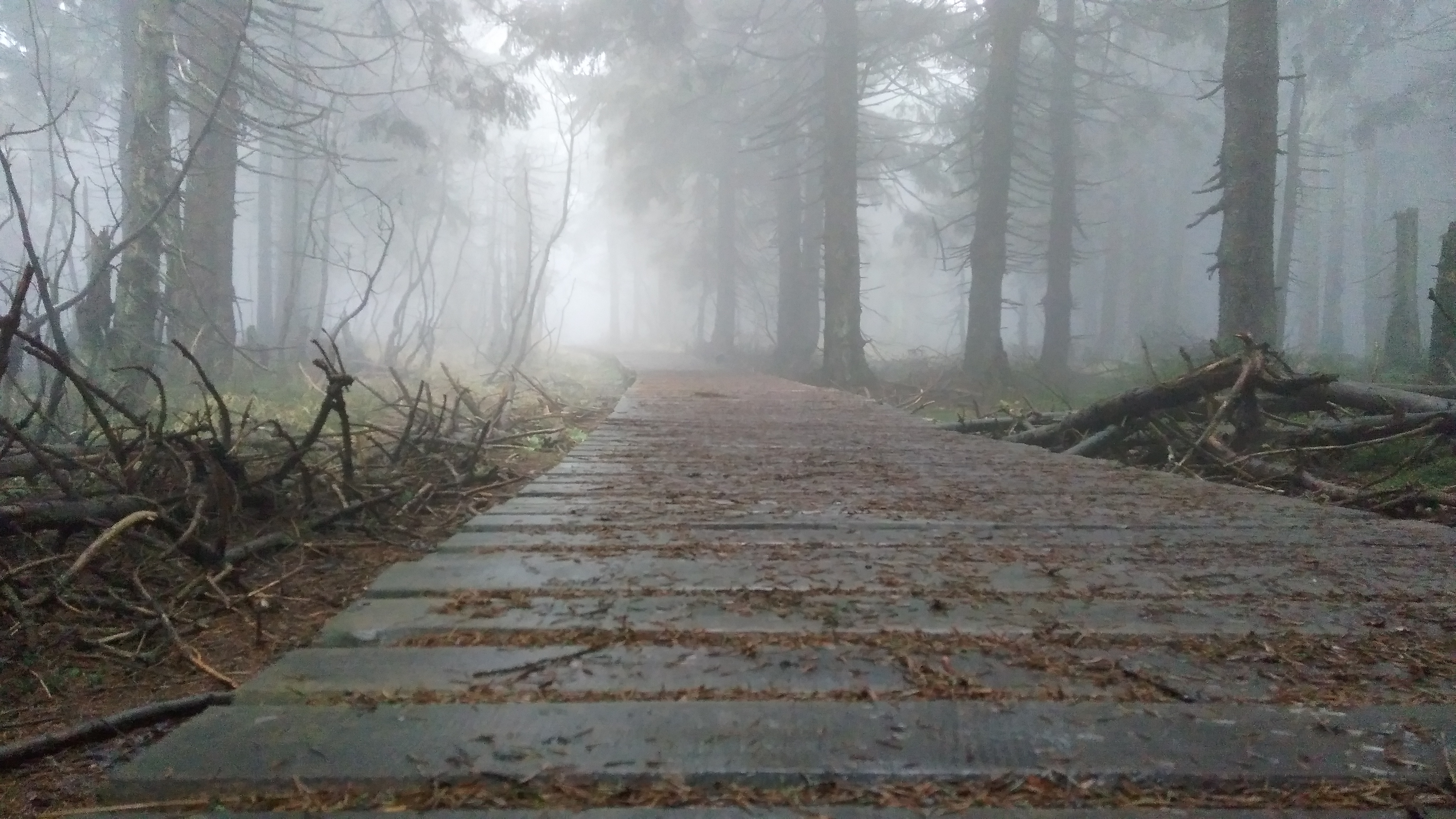 Stezka po cestě v Národní přírodní rezervaci Kněhyně - Čertův mlýn